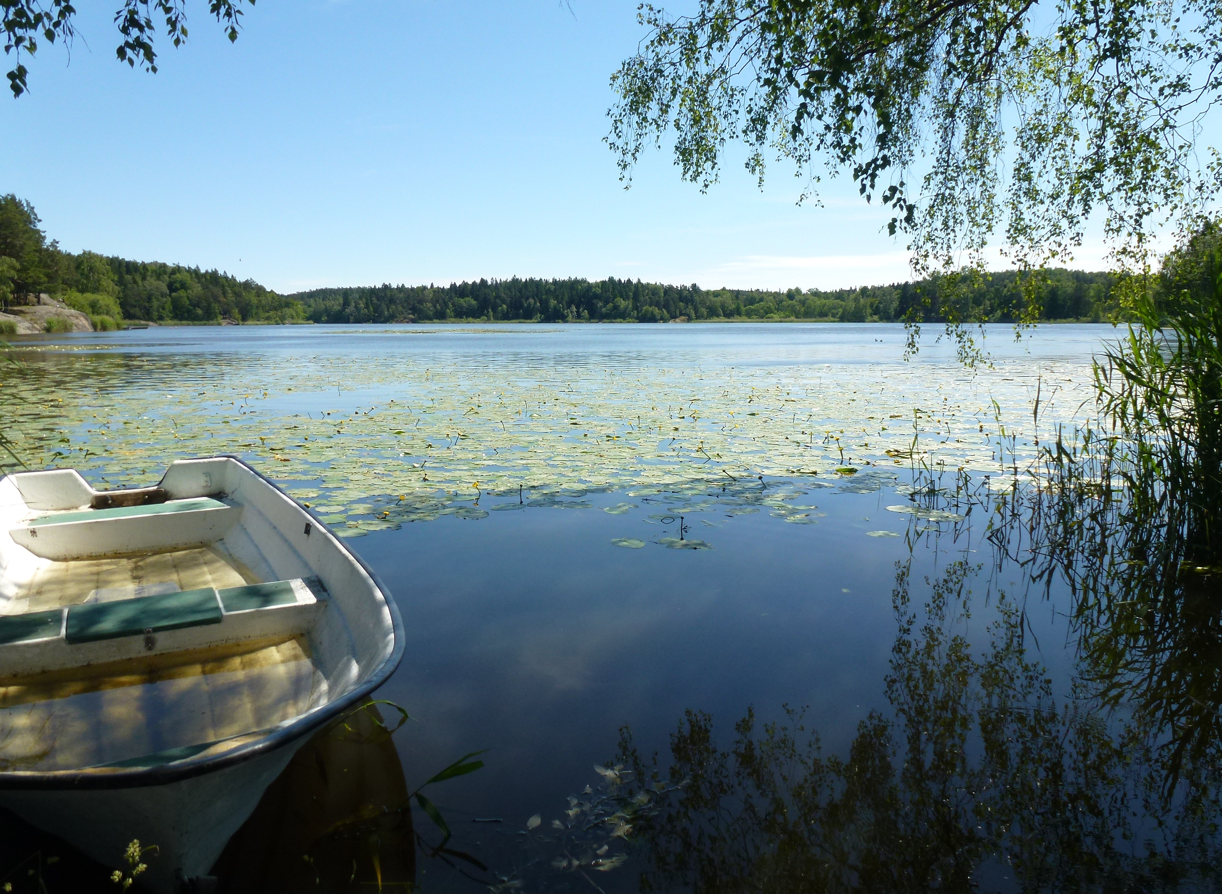 Trehörningen Sjödalen söder om Storön